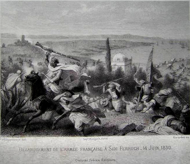 Gravure ancienne, Algérie. titre "Débarquement de l'armée Française à Sidi Ferruch 14 juin 1830". Dessinateur: Philippoteaux, Graveur : Girardet, Imprimeur: Mangeon Paris, Editeur: Garnier frères.